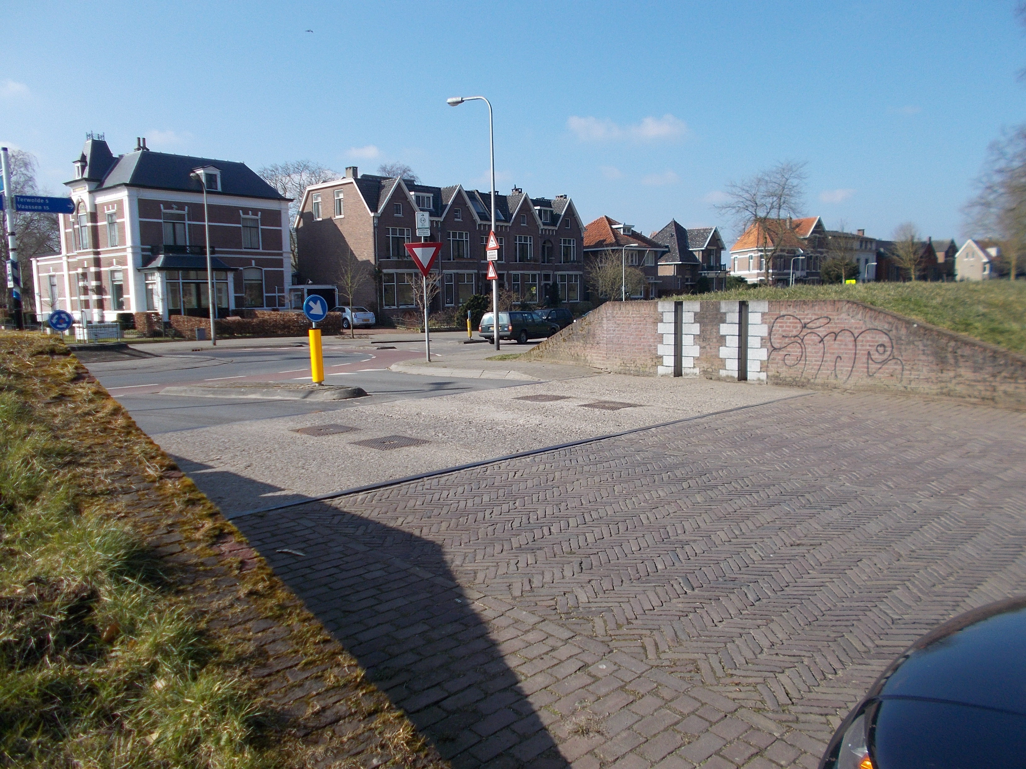 Coupure in de rivierdijk van de IJssel te Deventer